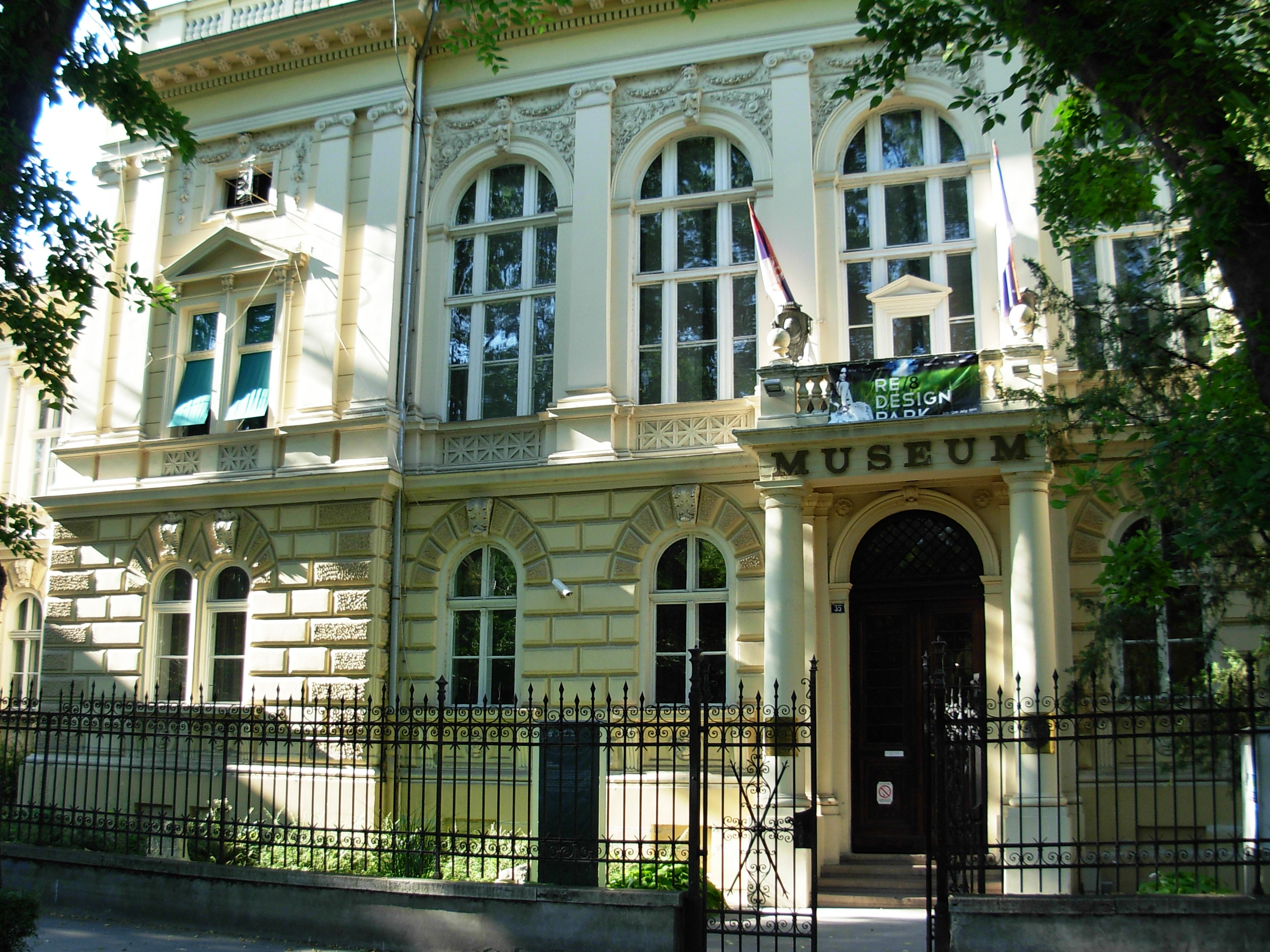 Ulaz u Muzej Vojvodine u Novom Sadu. Museum of Vojvodina Native nameМузеј ВојводинеLocationNovi SadCoordinates45° 15′ 23.57″ N, 19° 51′ 06.32″ E Established14 October 1847 Web page control : Q6941048 VIAF: 231993869 LCCN: n2012009683 GND: 4283993-2 WorldCat institution QS:P195,Q6941048